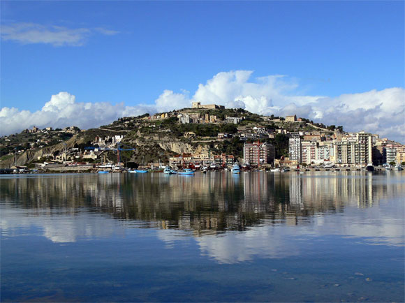 Panorama di Licata, visto dal braccio di levante